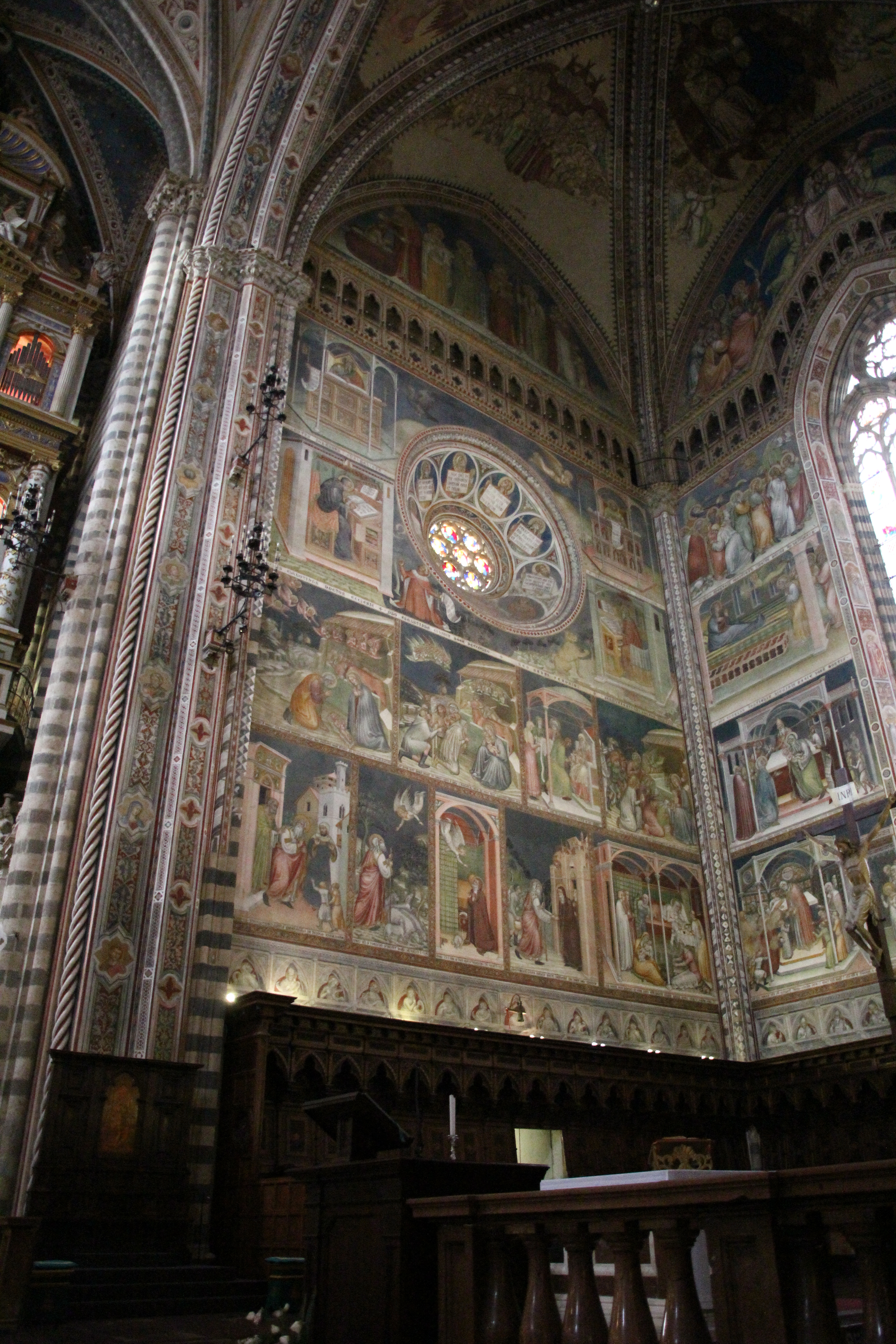 Orvieto, cattedrale di Santa Maria Assunta